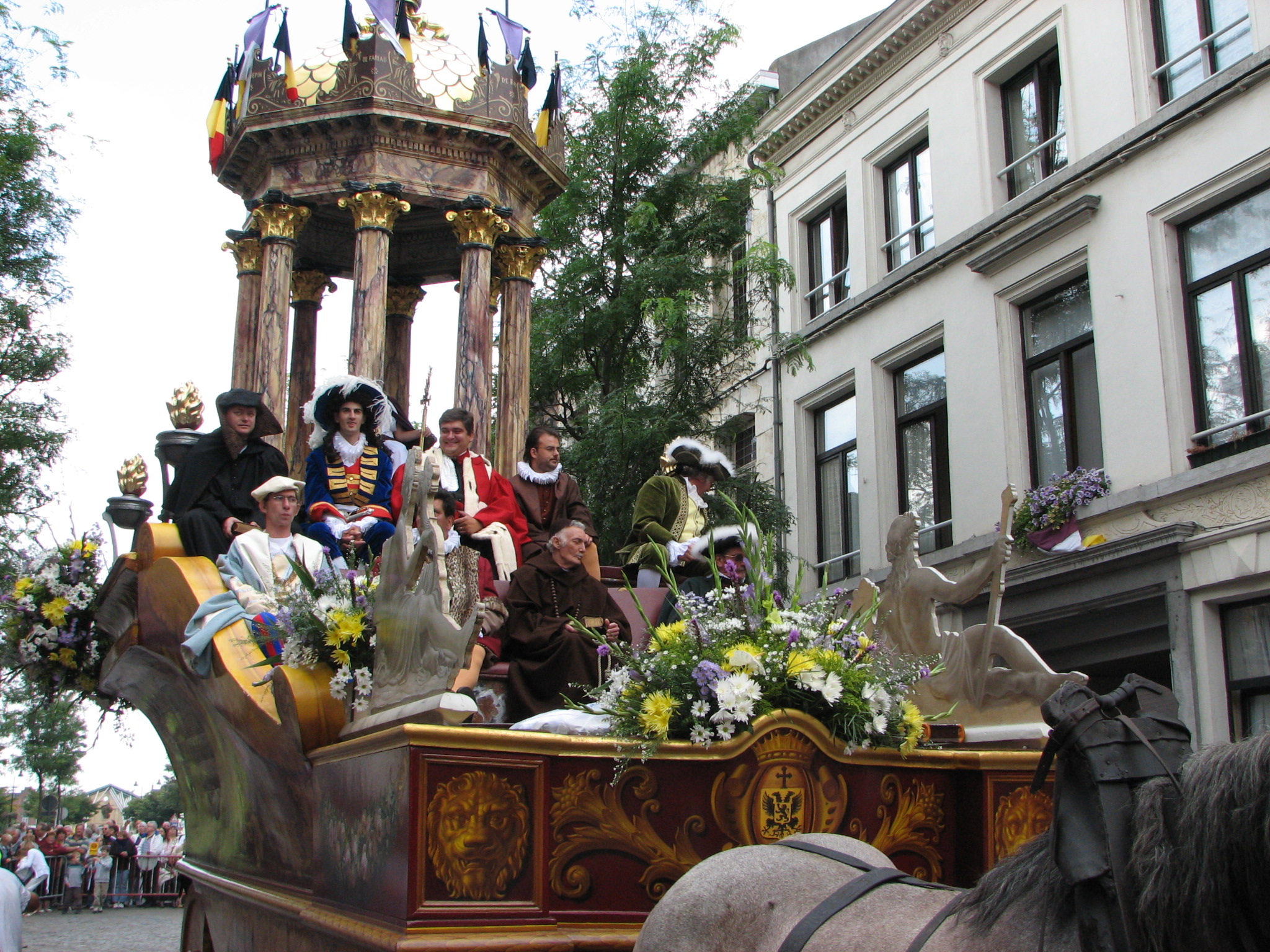 Le Char de la Ville dans le cortège de la Ducasse d'Ath, 2006